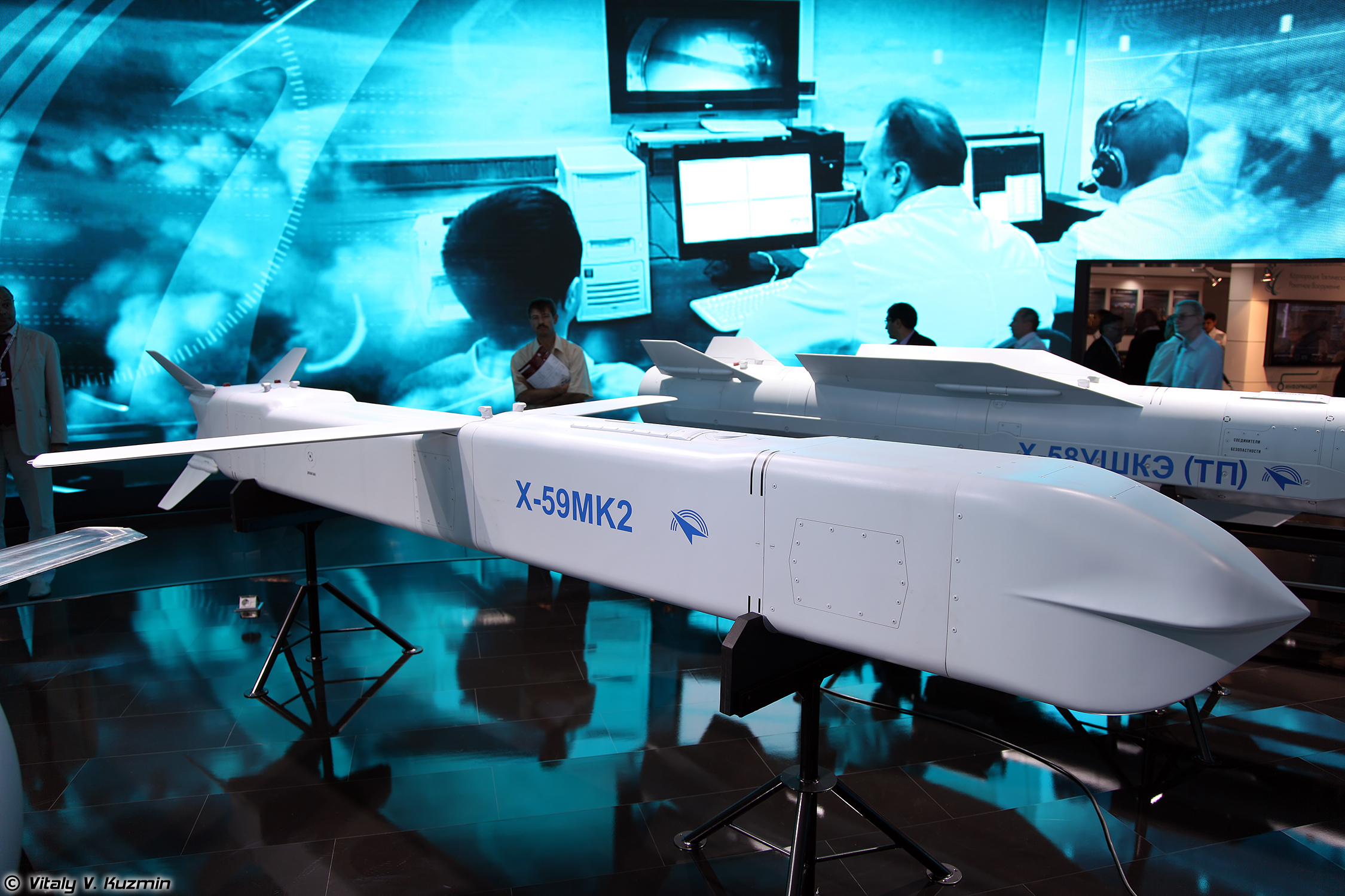 Авиационная управляемая ракета Х-59МК2